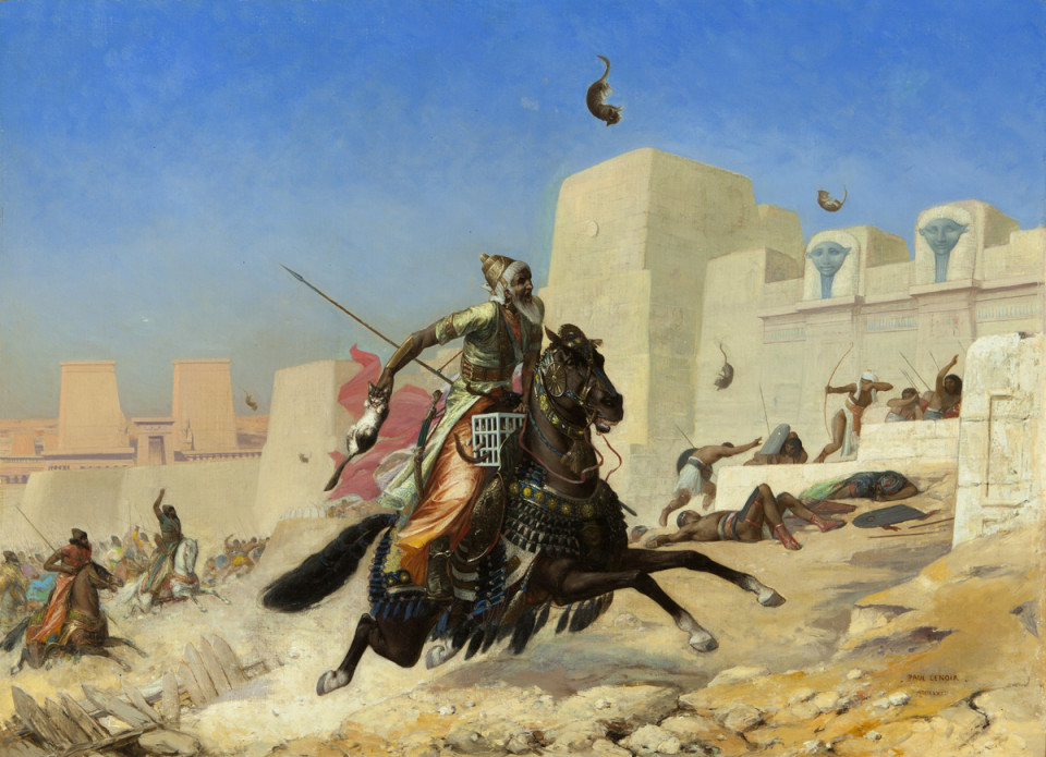 Le roi Cambyse au siège de Péluse par Paul-Marie Lenoir, huile sur toile, 1872. Tableau exposé au Salon parisien de 1873.